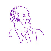 Portrait de François Marcantoni Auteur : Eric Menneteau